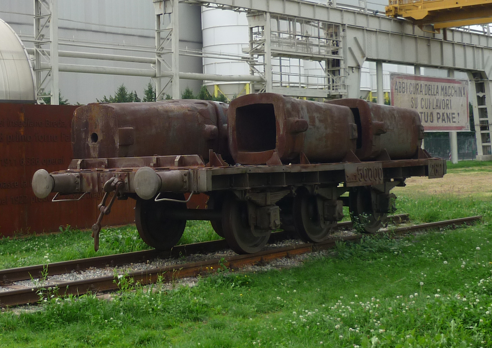 Carro Lingottiera (ritaglio da